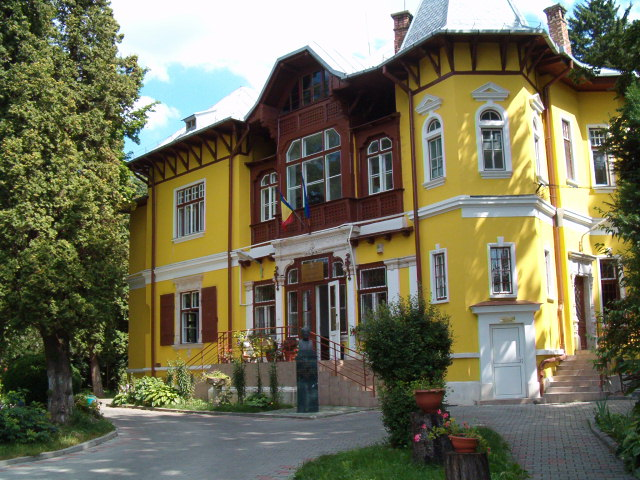 Cluj-Napoca, Institutul de Psihologie (str.Republicii nr.37)